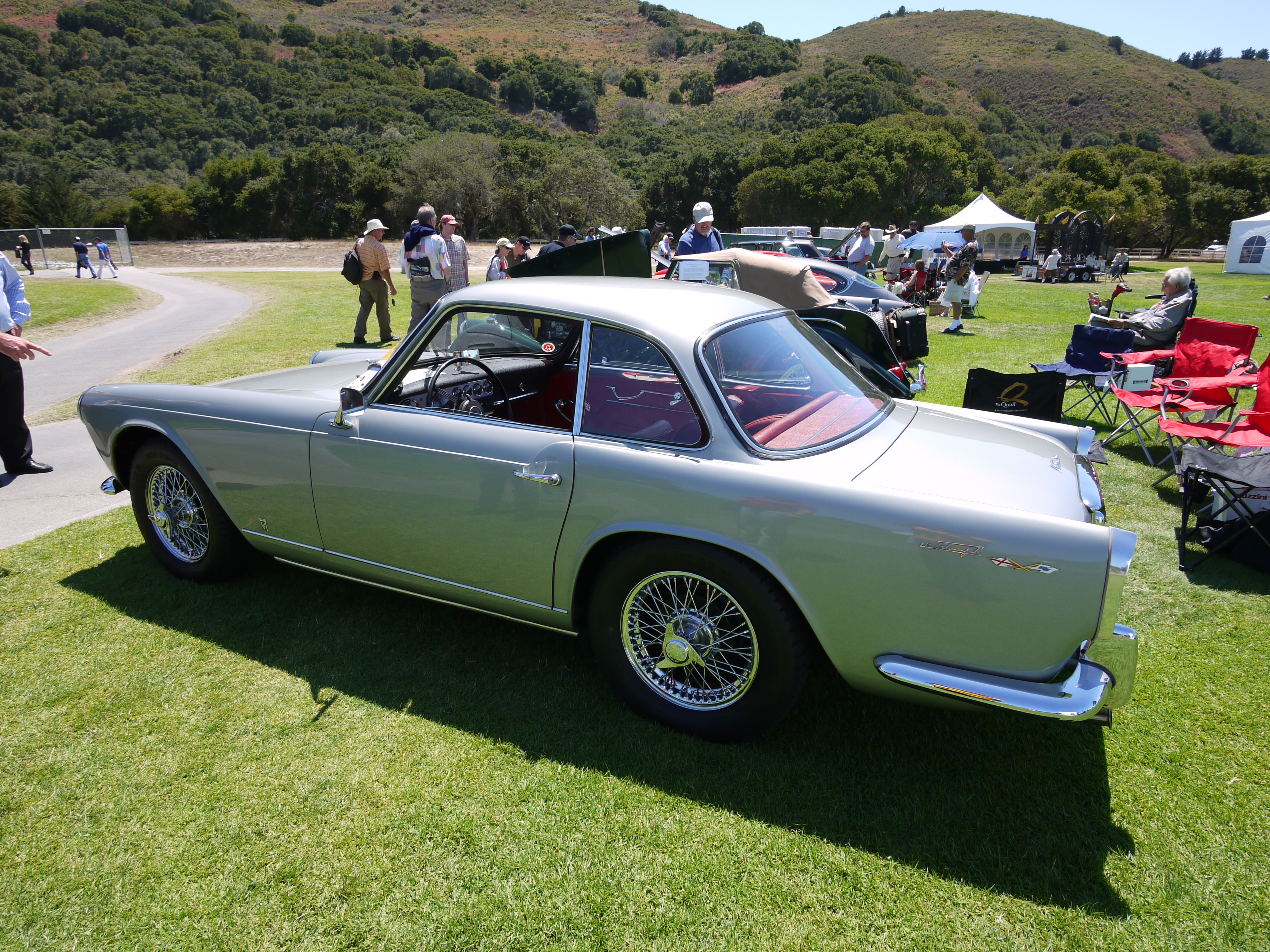 Triumph Italia, costruita dalla Vignale su autotelaio "TR3" (1960-1961)